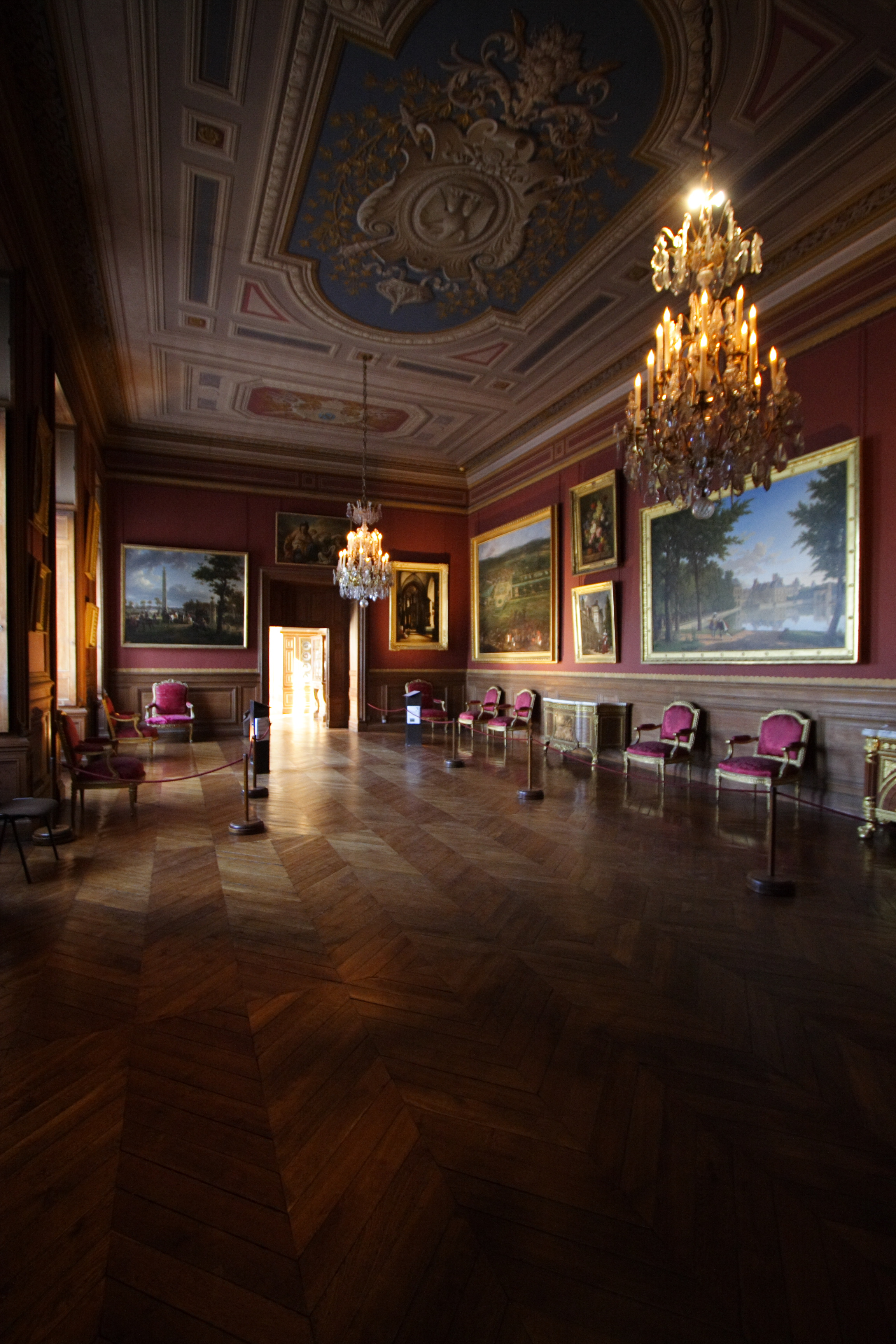 Die Prunkgalerie im Schloss Fontainebleau